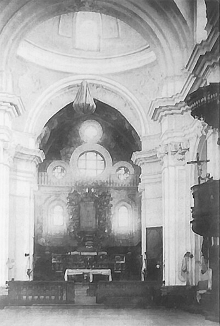 Interno dell'Abbazia Florense in stile Barocco (Anni '30) - Presbiterio